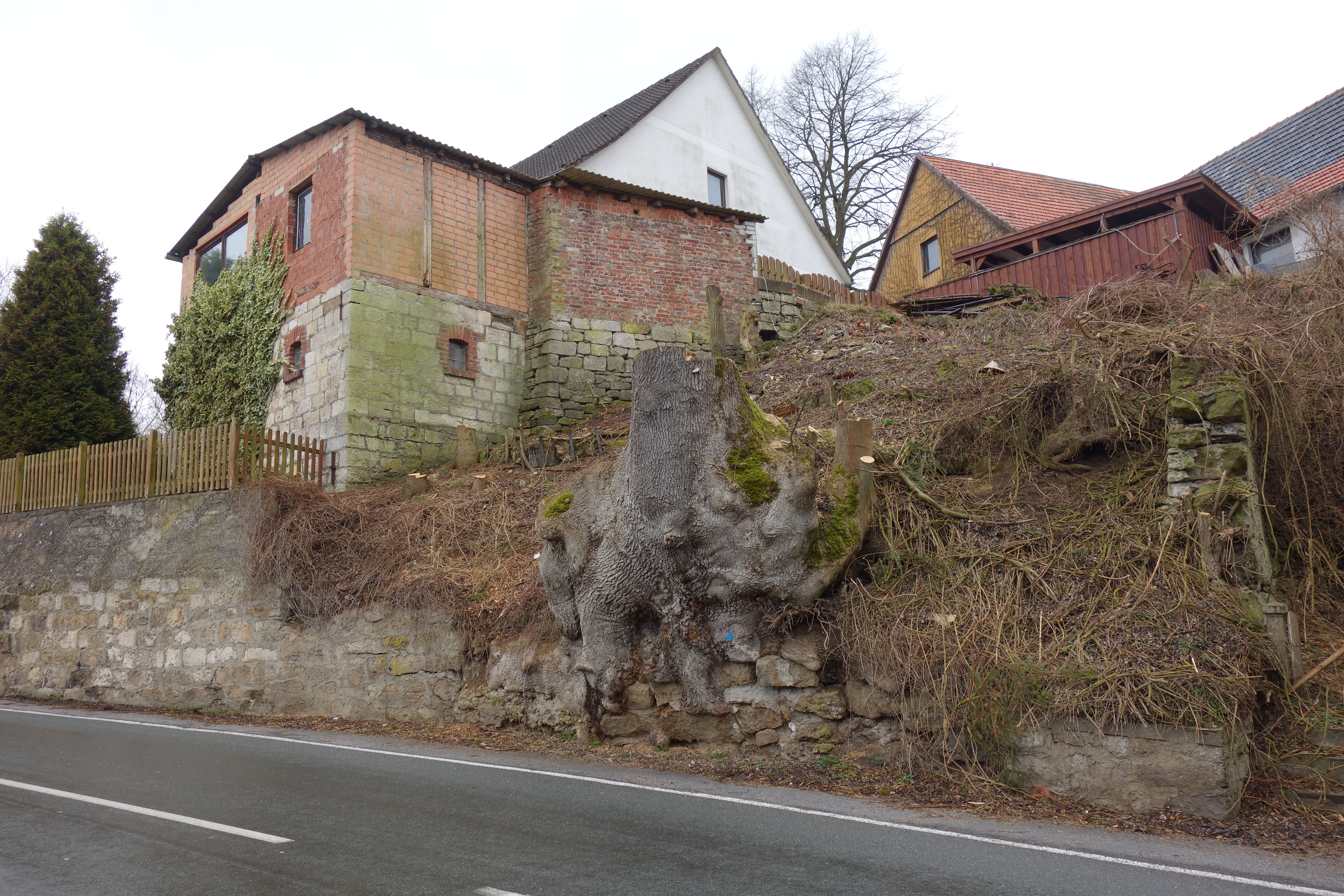 Baumstumpf vom Naturdenkmal 154 Esche nach Fällung. Die 500 Jahre alte Esche in Obermarsberg lag an der alten Stadtmauer.